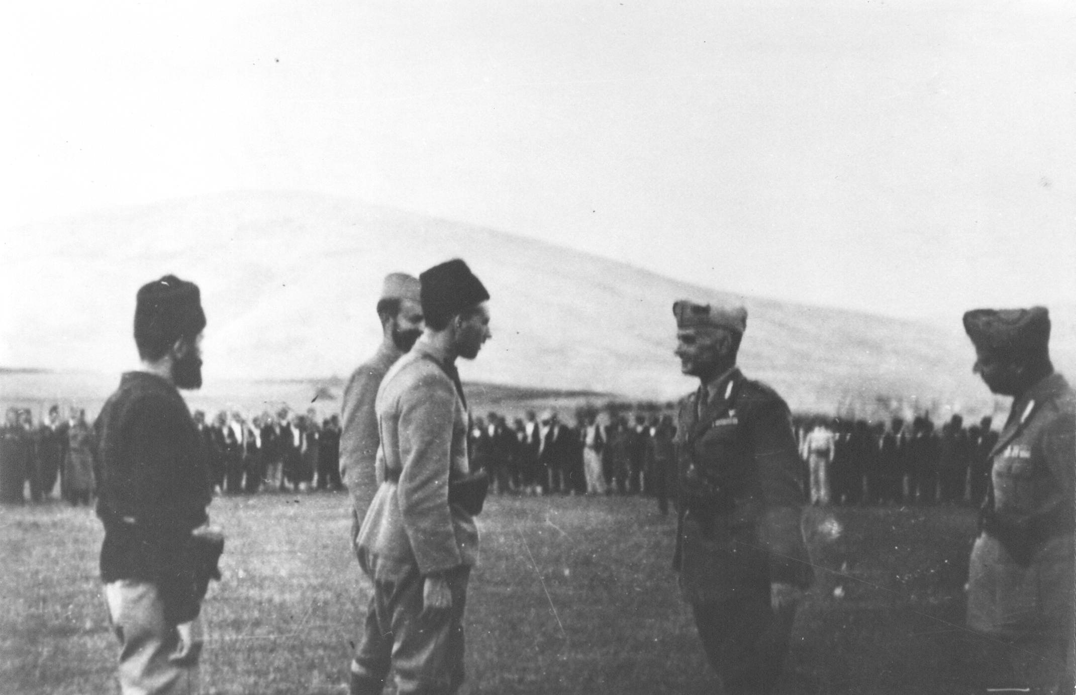 Srpskohrvatski / српскохрватски: Četnički komandanti Cvjetičanin i Brane Bogunović predaju raport italijanskom komandantu, Bosansko Grahovo,avgust 1942.